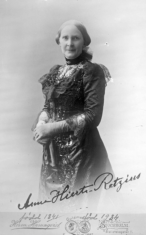 Depicted person: Anna Hierta-Retzius, PROFESSORSKA